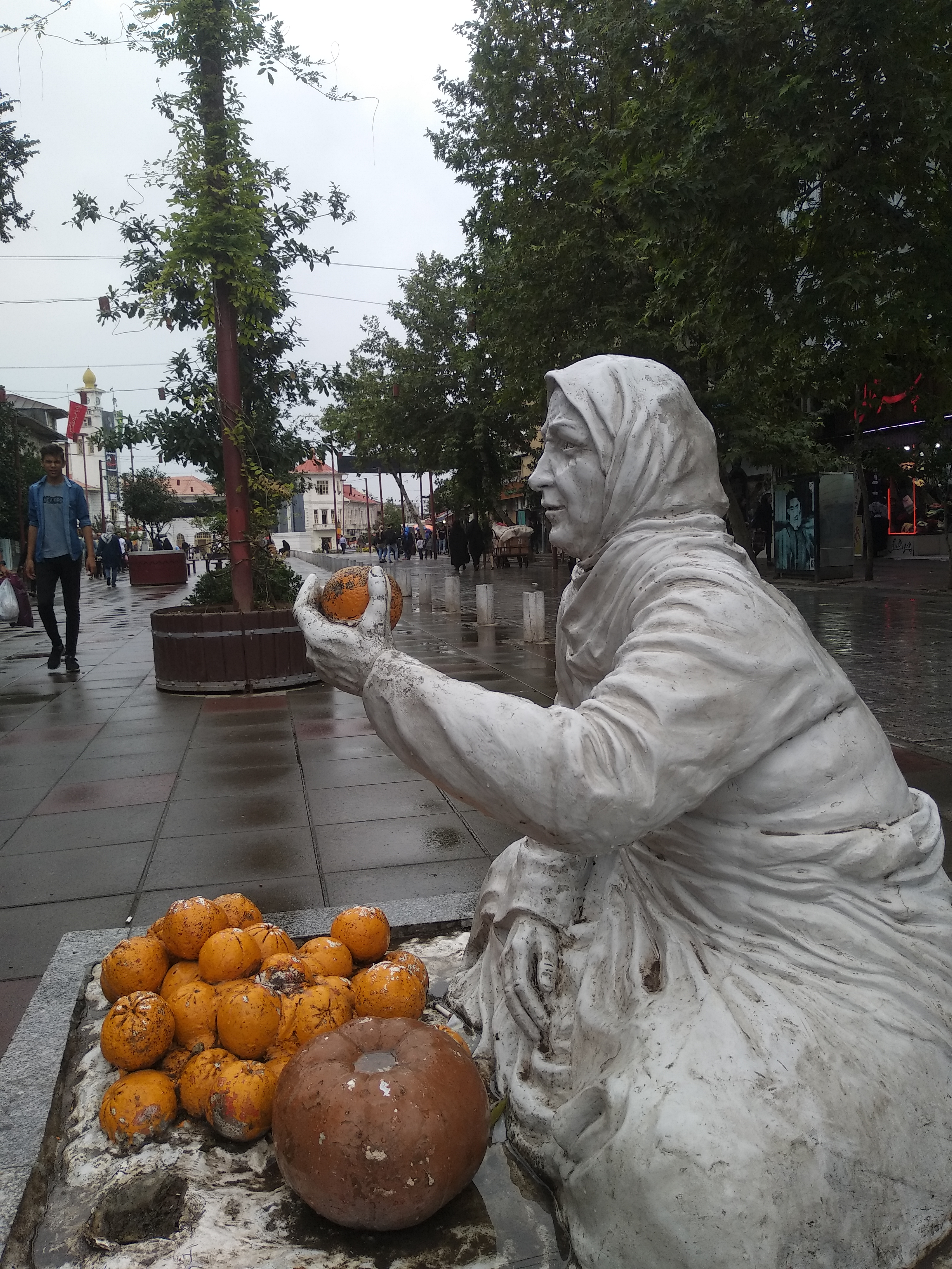 مجموعه میدان، ساختمان و کتابخانه شهرداری گیلکی: بازار مج نام خیلی زمات کی ابیره- بازار مج قسمت ایی گولی نان و پنیره